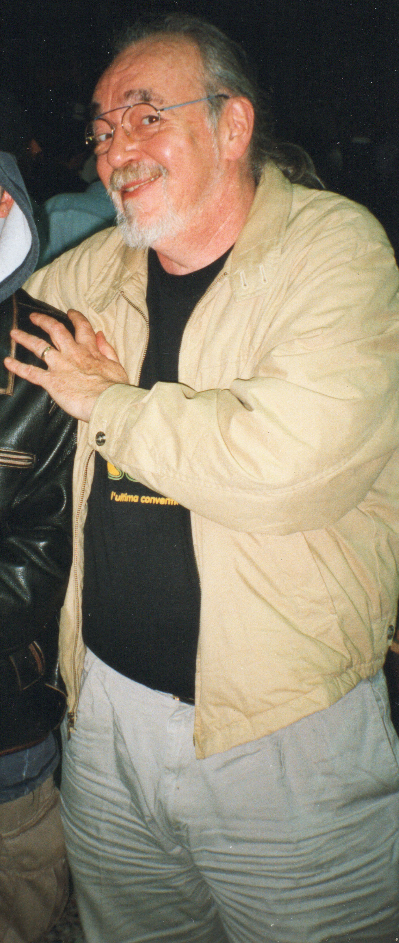 Gary Gygax, autore del gioco di ruolo Dungeons and Dragons alla convention di giochi ModCon, settembre 1999.